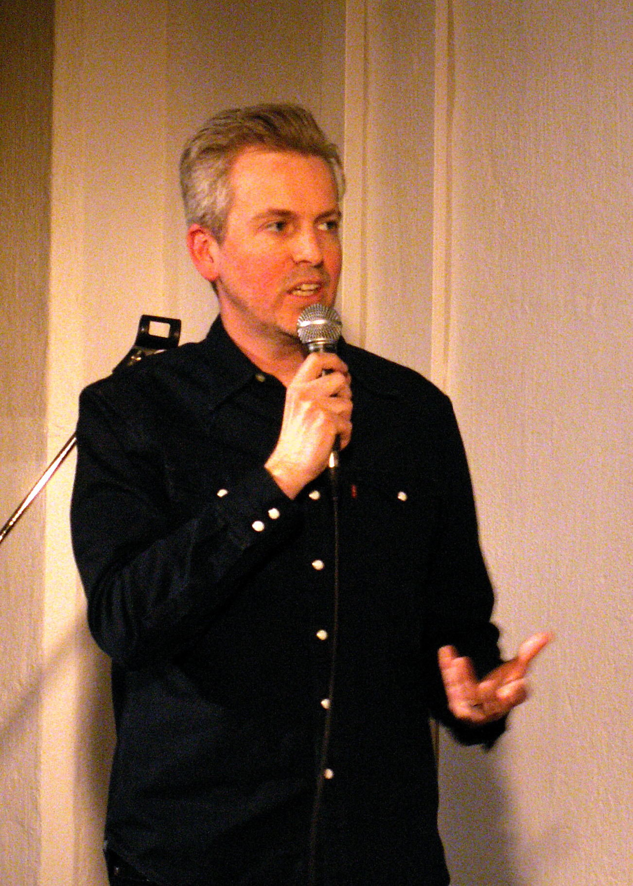 Mattias Hagberg, svenskt journalist, debattör och författare. Fotograferad på releaseevent för De användbara i Göteborgs litteraturhus.